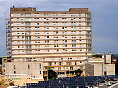 El Hospital militar de San Carlos (Población de San Carlos, San Fernando)